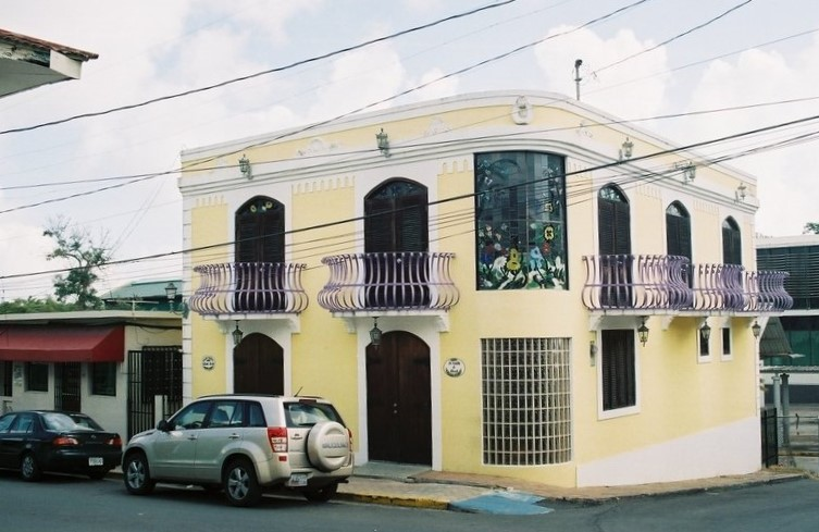 Casa Museo Federico Degetau, Aibonito, Puerto Rico